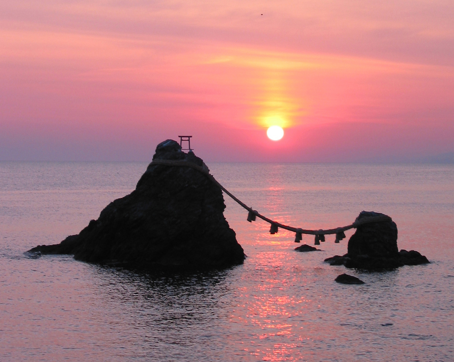 Схід сонця біля Одружених скель Святилища Футамі Окітама: квартал Футамі, місто Ісе, префектура Міє, Японія